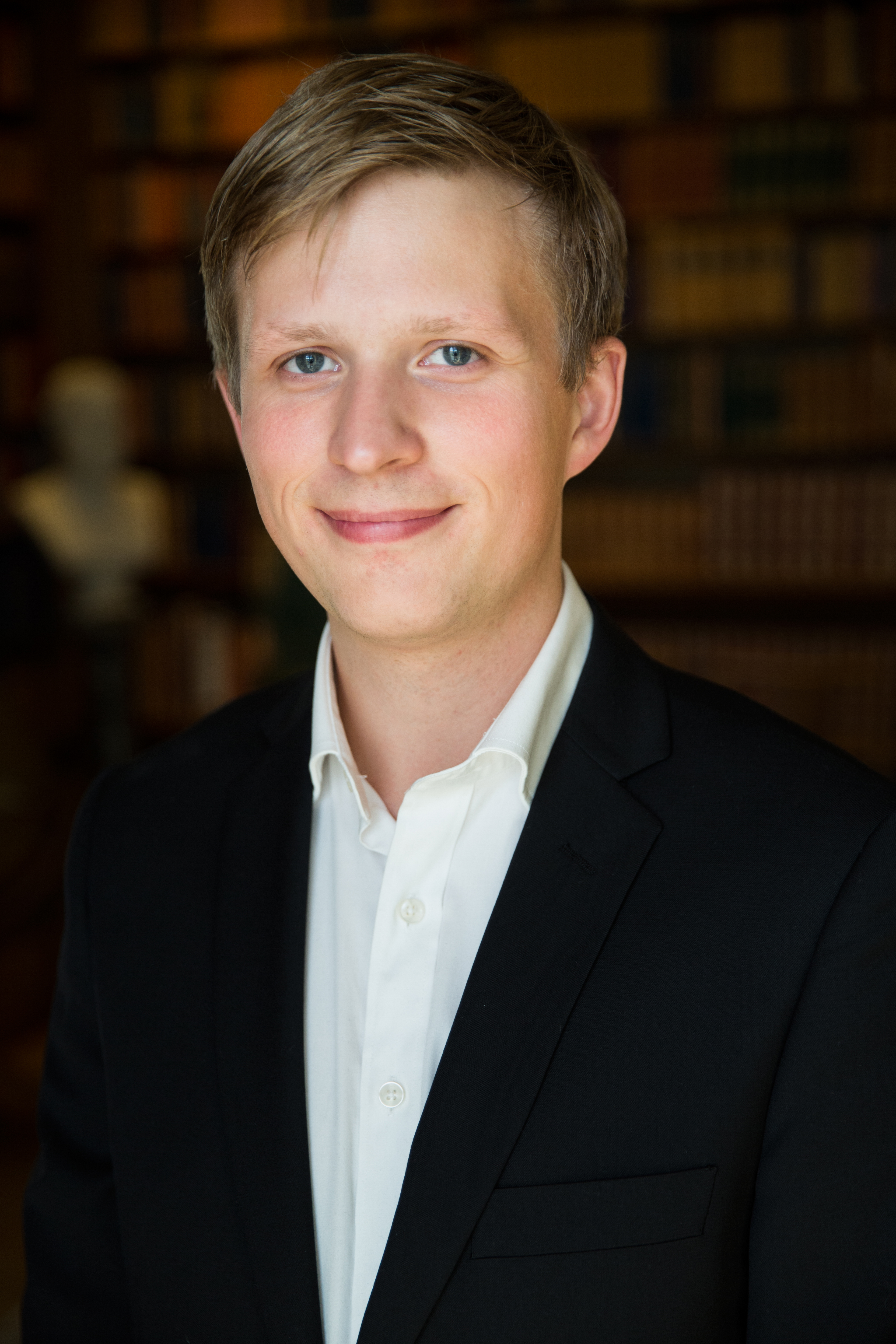 Journalisten Kristoffer Örstadius.